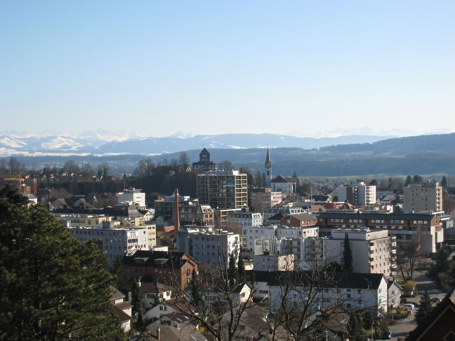 Uster Panorama